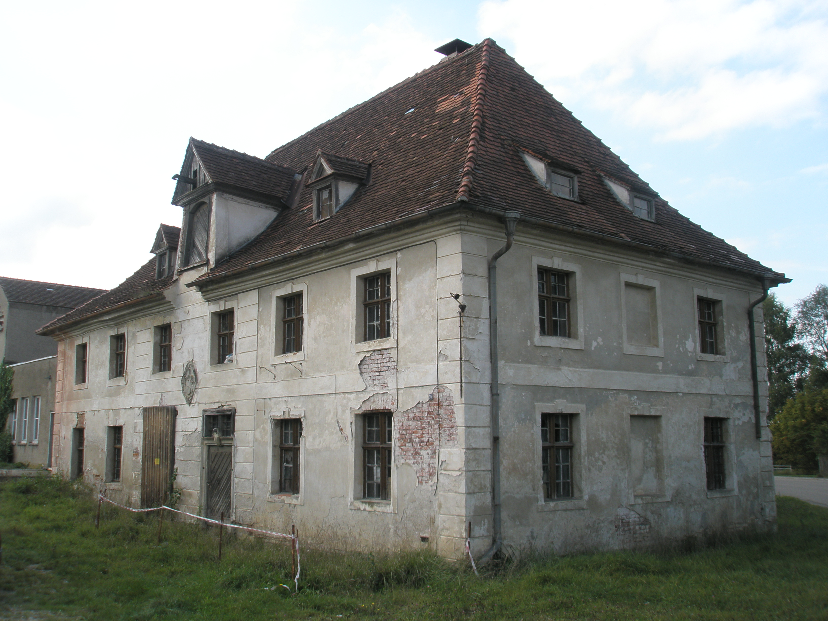 Die Schwendier Schlossmühle, erbaut im Jahr 1743.